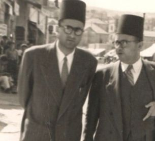 El Jajam Isaac Chehebar (derecha) junto al Jajam Iaacob Attie (izquierda)